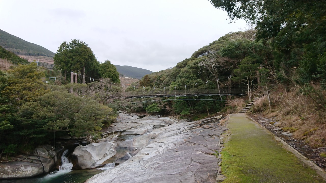 鮎もどし自然公園（対馬市厳原町内山）